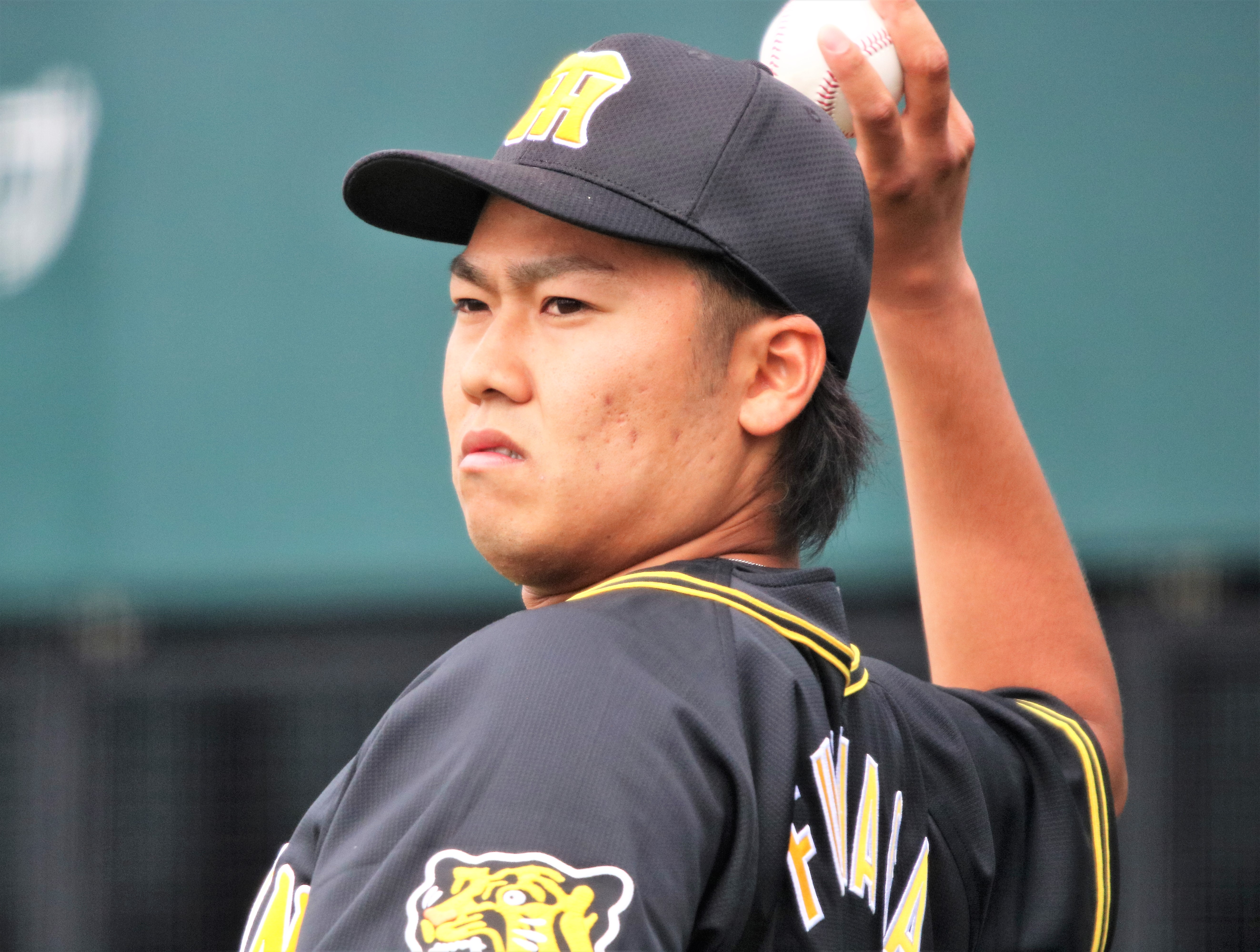 2018/5/1 ウエスタンリーグ